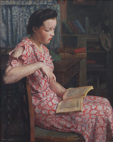 tableau